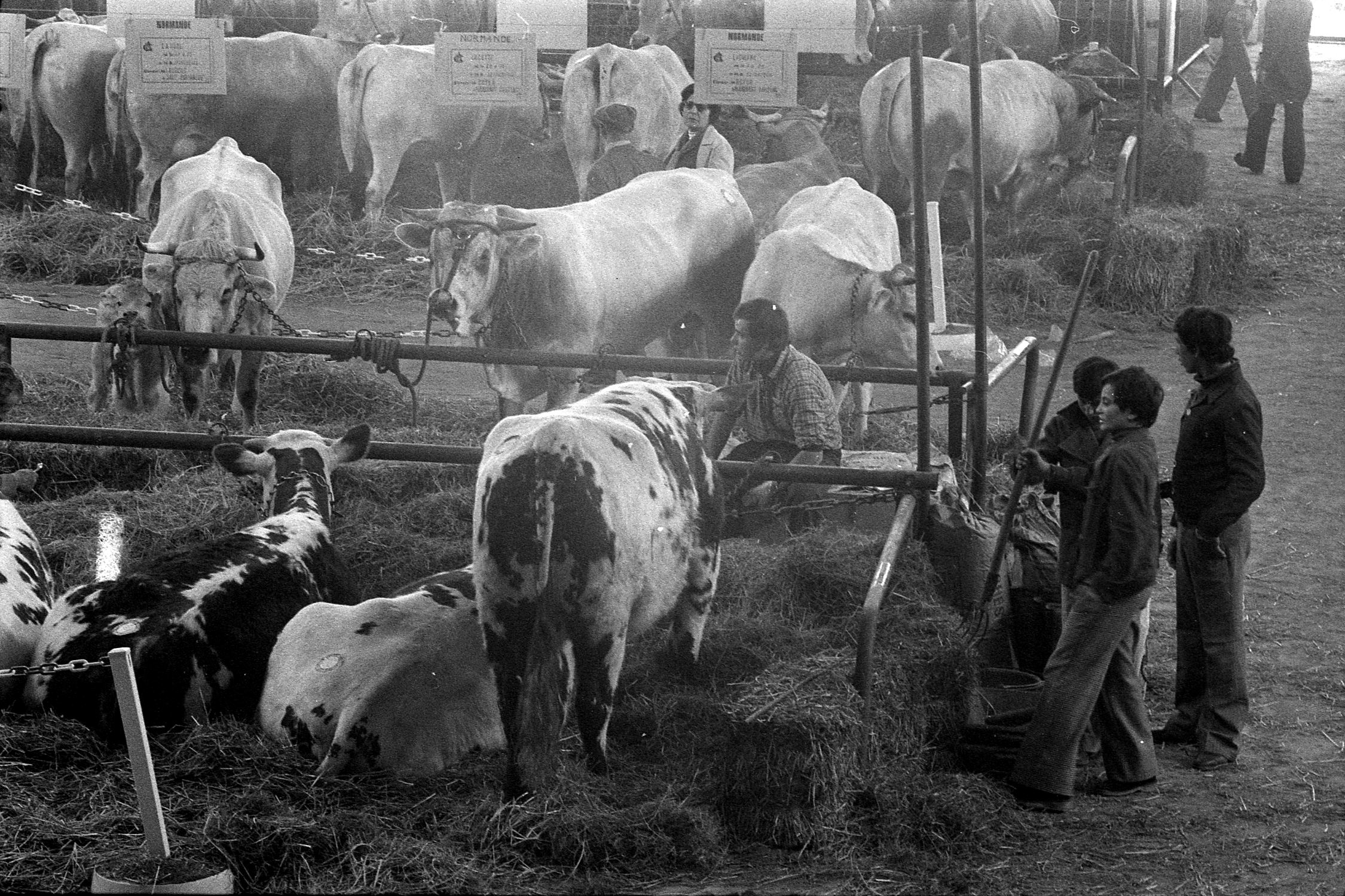 Parc des Expositions (île du Ramier). 4 avril 1978. Vue en plongée sur les stands de bovins ; à droite trois jeunes garçons, l'un d'eux tient une fourche . Cliché pris lors de l'inauguration du 44ème Concours régional agricole.